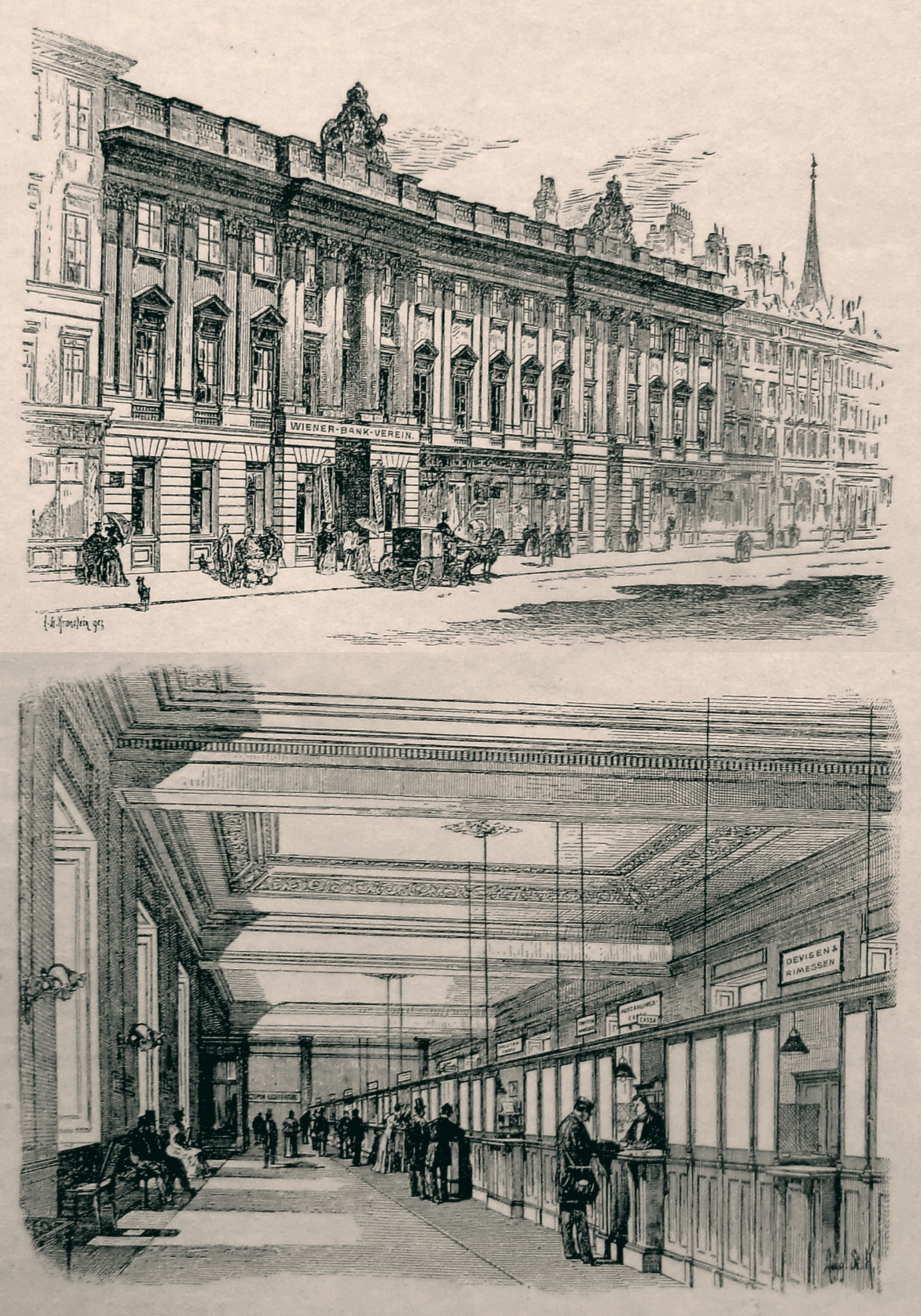 Wiener Bankverein Gebäude und Schalterhalle in der Herrengasse, 1010 Wien (Collage)